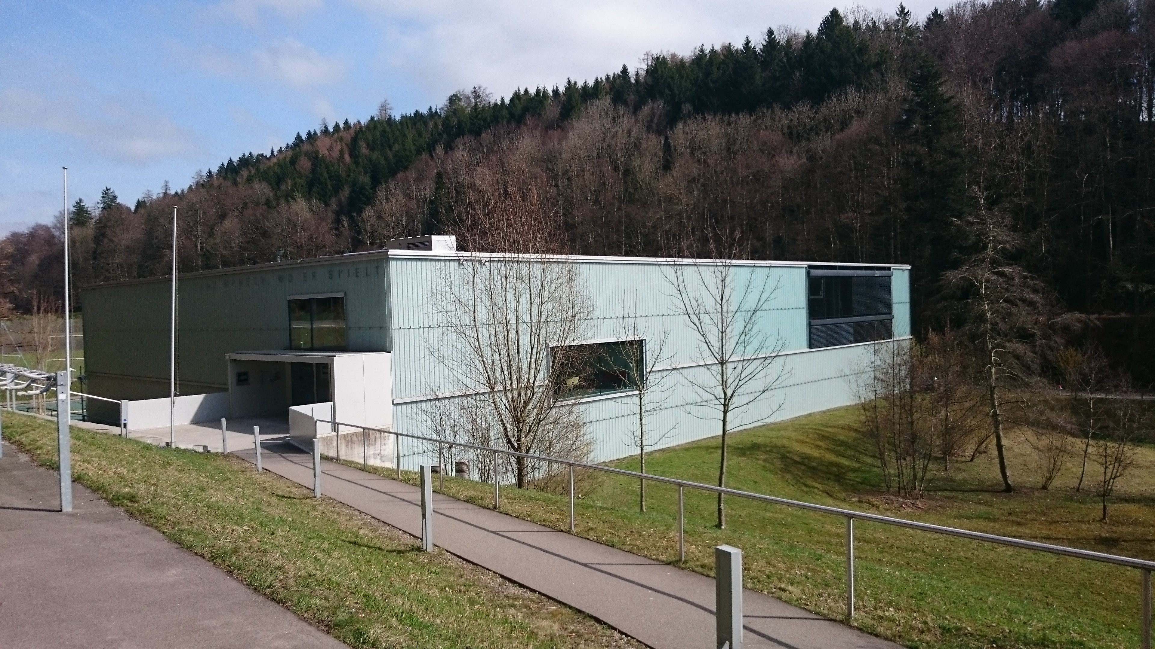 Die wiederaufgebaute Turnhalle des "Gewerblichen Berufs- und Weiterbildungszentrum St. Gallen."